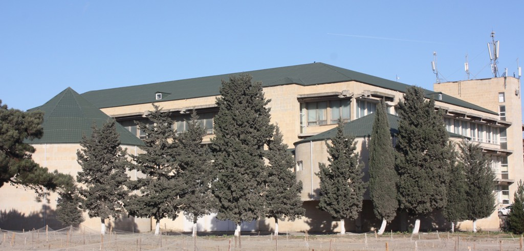 Здание Института Генетических Ресурсов Национальной Академии Наук Азербайджана